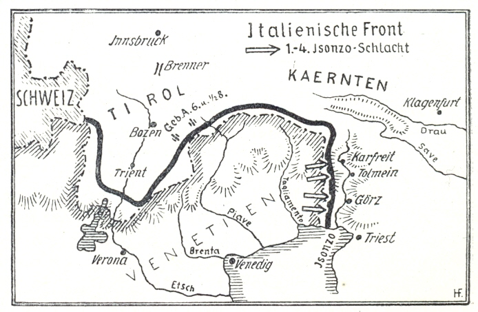 Karte Seite 37: Italienische Front 1915